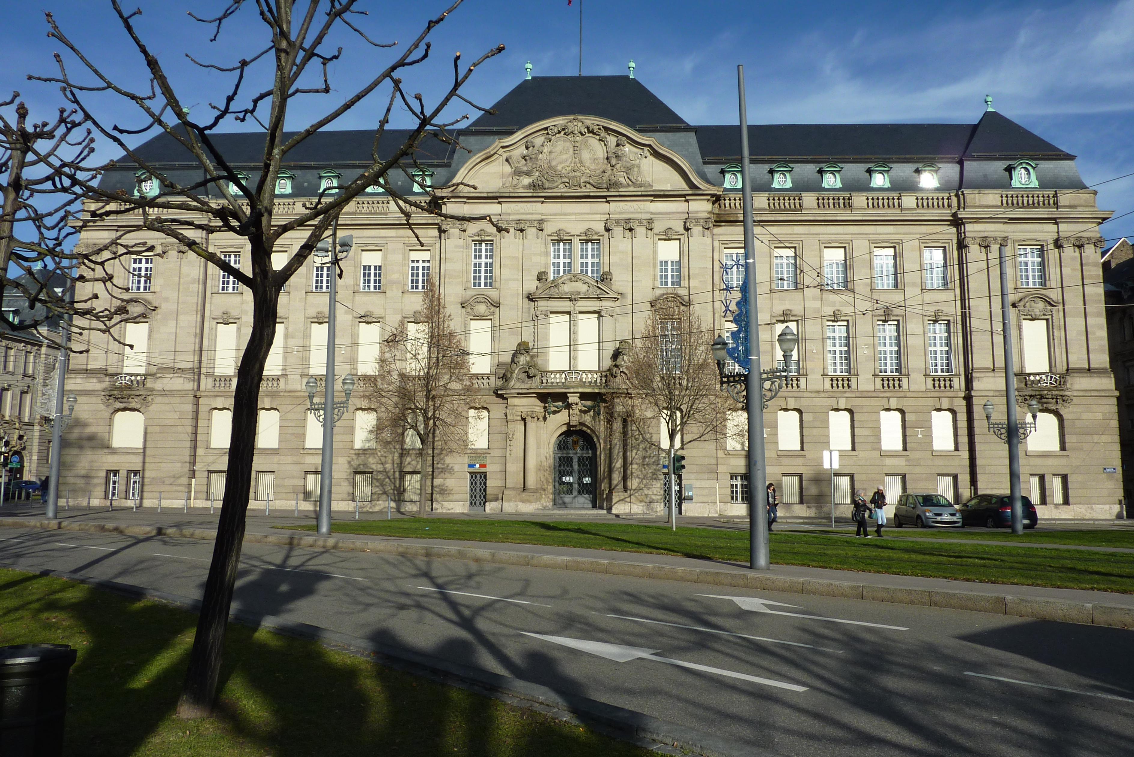 Préfecture de la région Alsace, préfecture du Bas-Rhin à Strasbourg en décembre